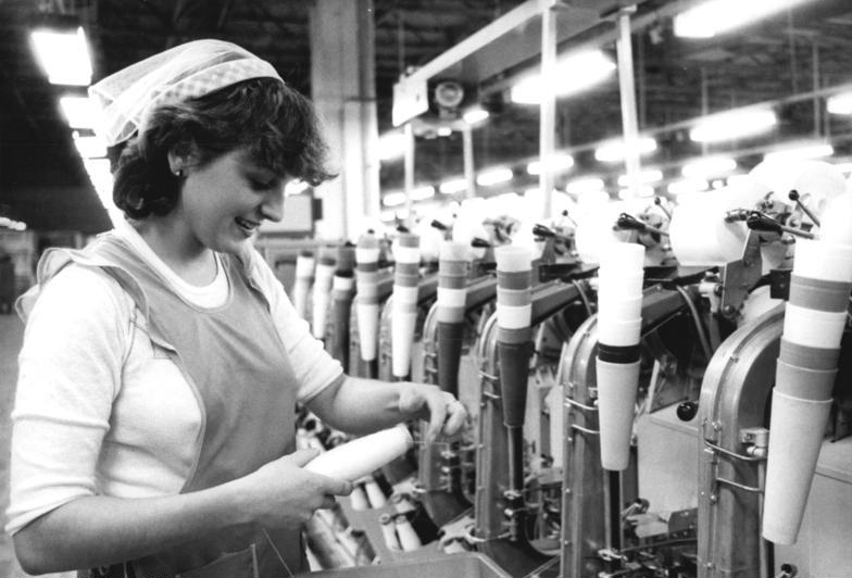 ADN-ZB-Ludwig 25.4.1986 pra-Bez. Erfurt: Wettbewerb. Eine zusätzliche Produktion von 59,1 Tonnen Baumwollgarne konnten die Werktätigen der Baumwollspinnerei Leinefelde nach dem ersten Quartal 1986 abrechnen. An Kreuzspulmaschinen aus der CSSR arbeitet die Automatenspulerin Evelyn Seeboth.